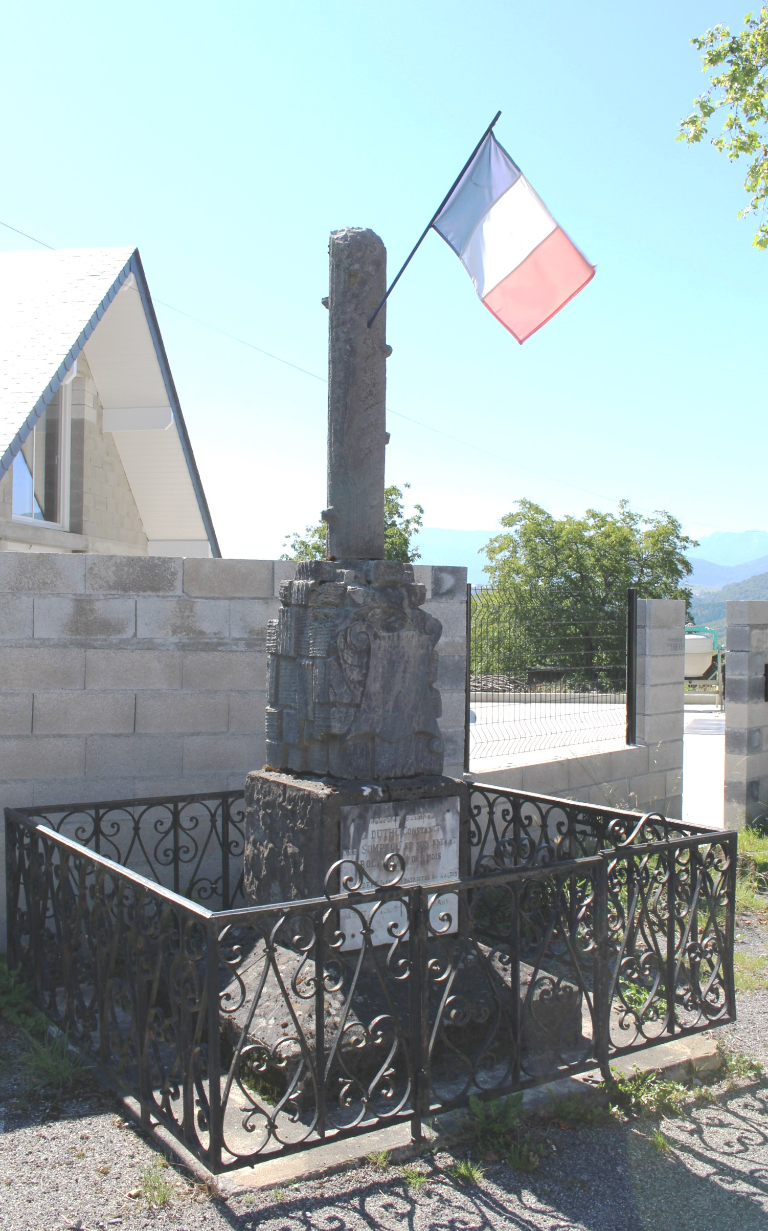 Monument aux morts de Tilhouse (Hautes-Pyrénées)